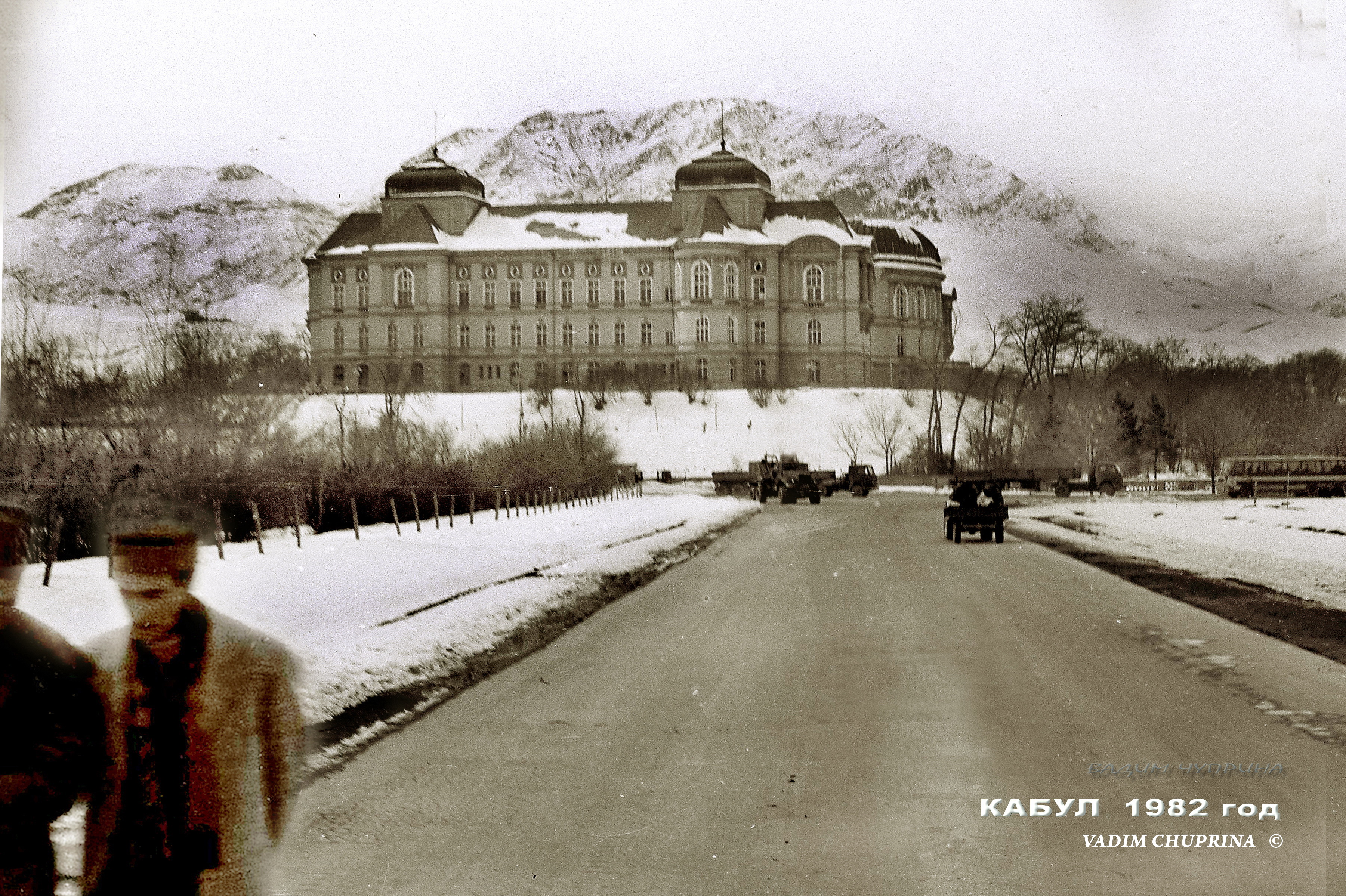 Кабул 1982 год